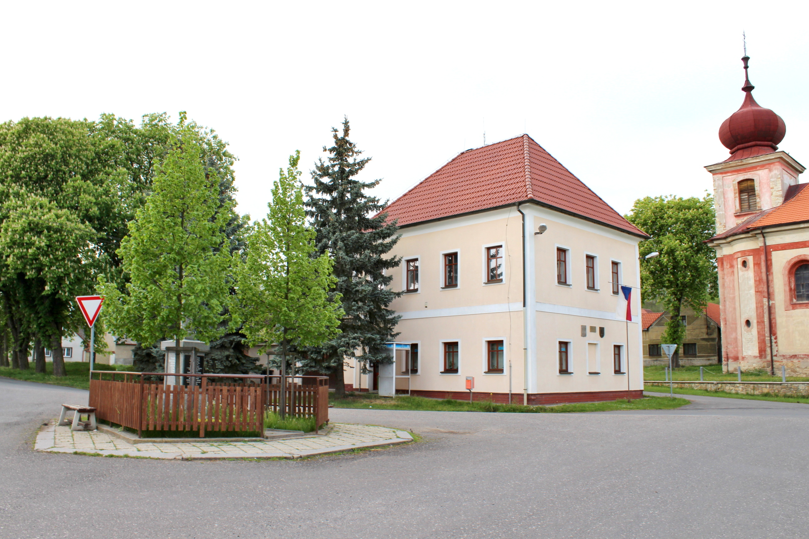 Třtice náves